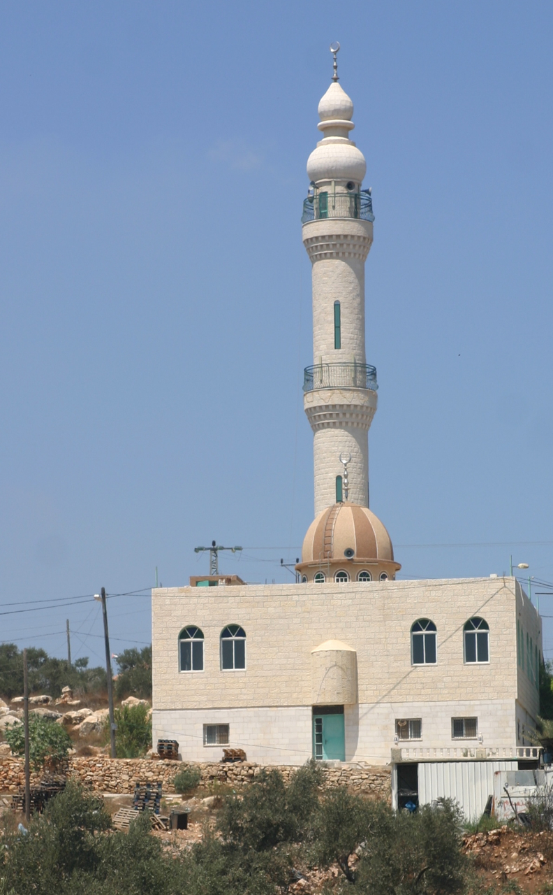 Salfeet, Palästina.